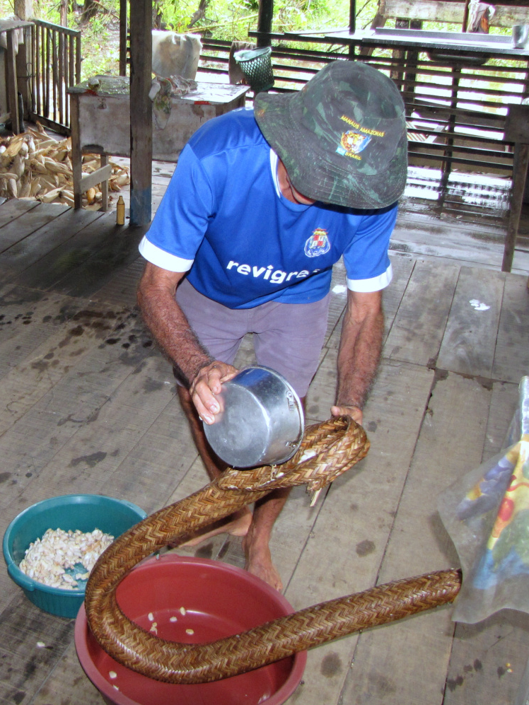 Local: Projeto Agroextrativista (PAE) Cacoal Grande, em Óbidos (PA) Data: 9 de junho de 2010 Crédito: Incra/ASCOM/Luís Gustavo